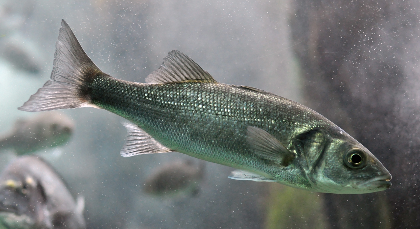 Dicentrarchus labrax